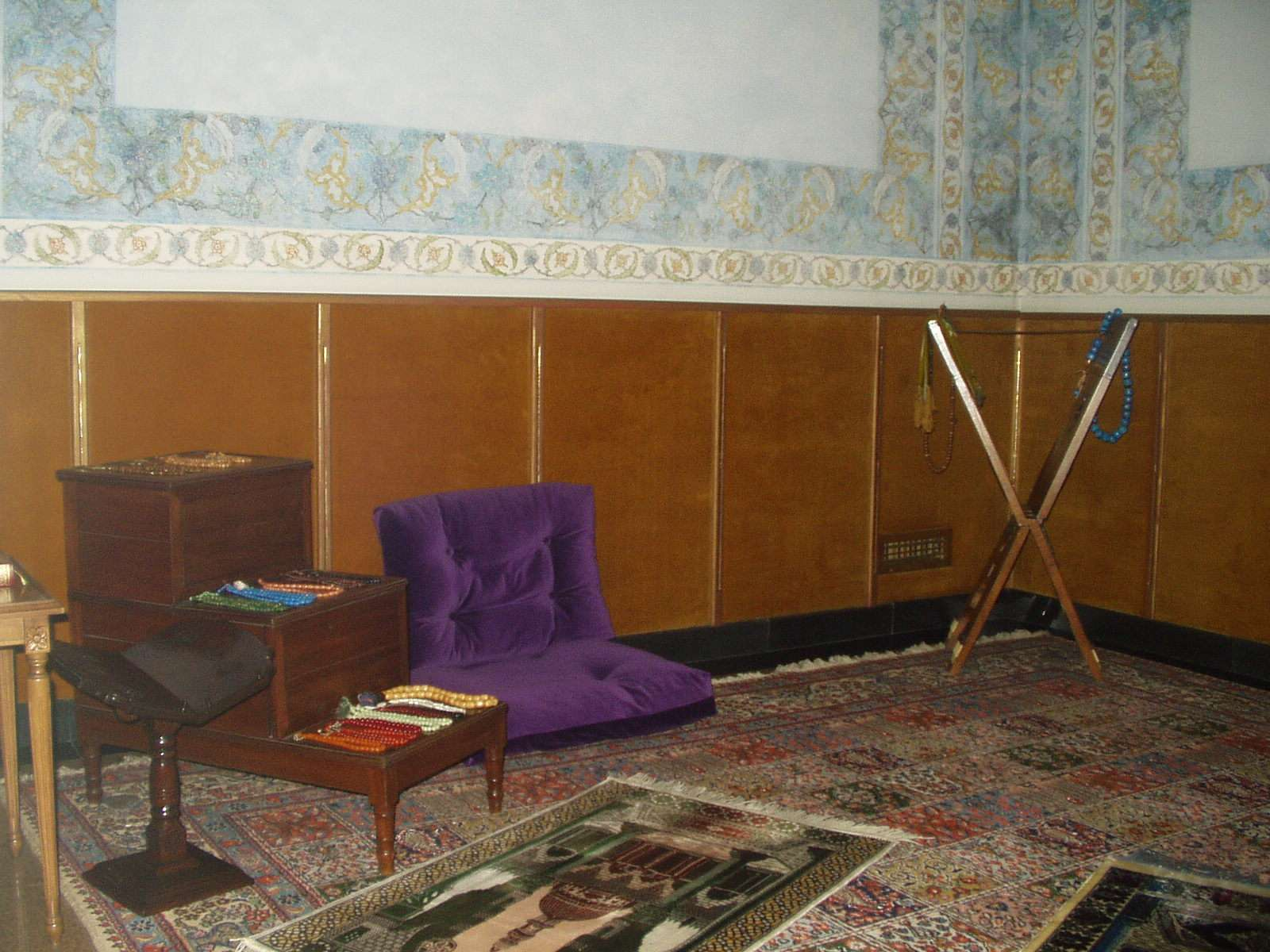 Mesdžid